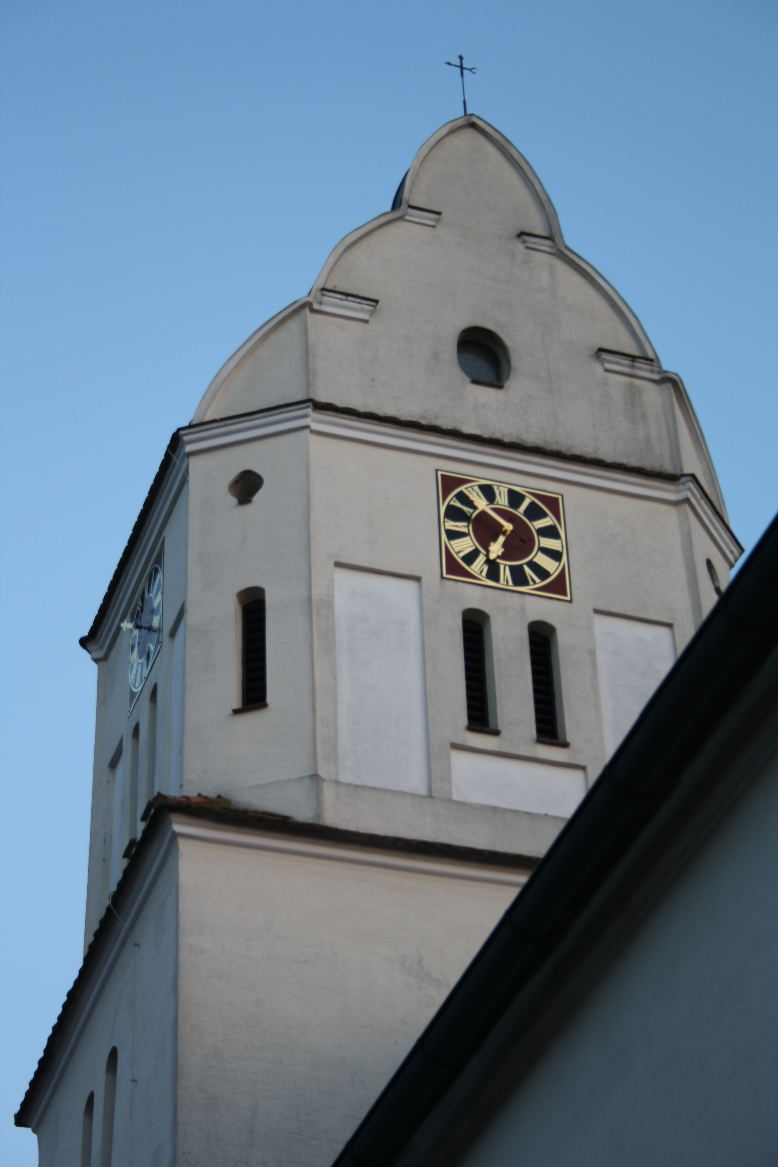 Katholische Filialkirche St. Oswald in Oberglauheim (Höchstädt an der Donau), Turmoberbau von 1682 von Georg Danner (Thanner) mit Satteldach